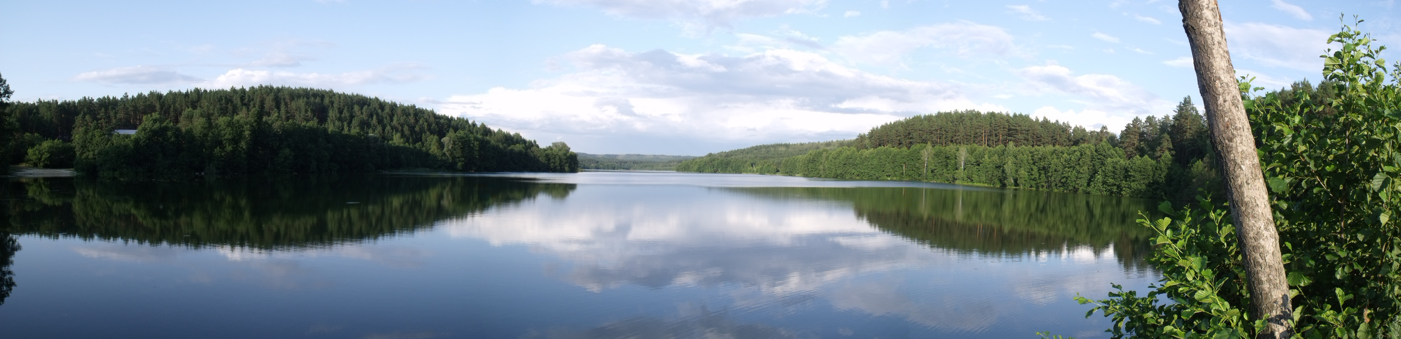 Юловский пруд: Кв. NN 59, 78, 79 Глотовского лесничества Инзенского лесхоза, Инзенский район, Ульяновская область This image is related to the protected area of Russia number 7310041